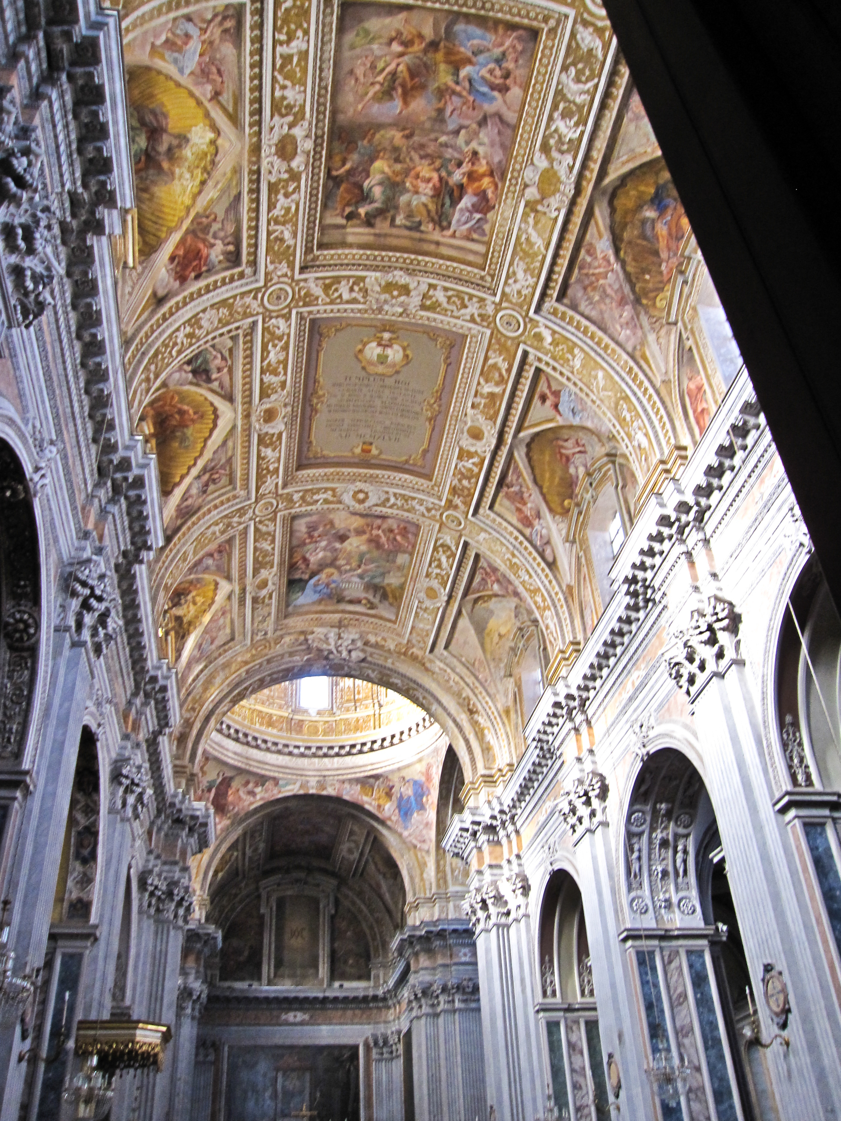 La volta affrescata Napoli - Chiesa di Santa Maria degli Angeli a Pizzofalcone